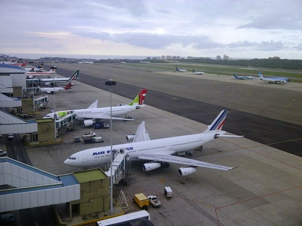 aeropuerto de maiquetia 2011